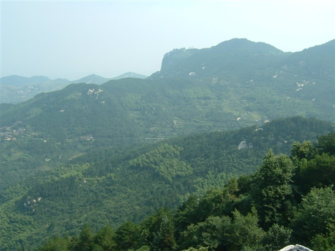 中国湖北省黄岡市団風県・大崎山